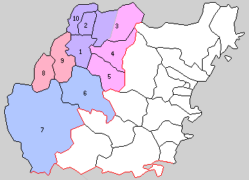 宮崎県西臼杵郡の町村制時点の町村。